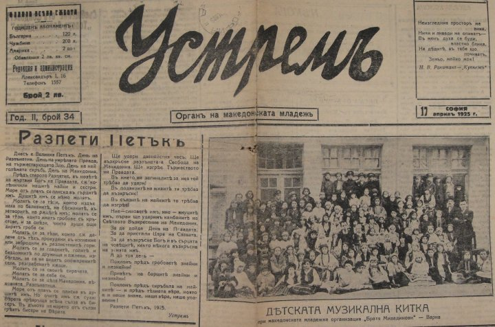 Главата на вестник Устрем, година ІІ, брой 34.